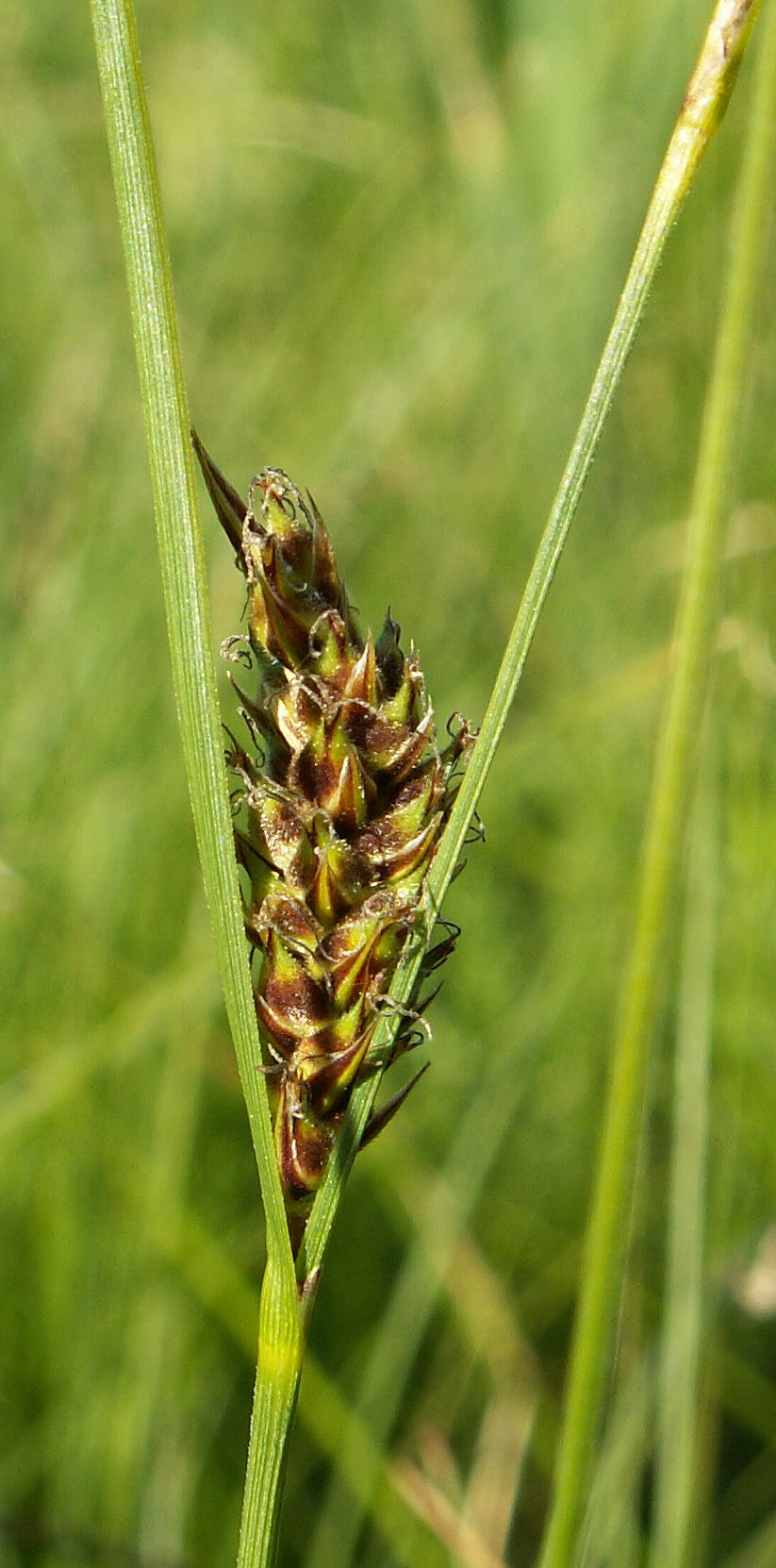 Carex lasiocarpa, female spike. Czaplinek, NW Poland